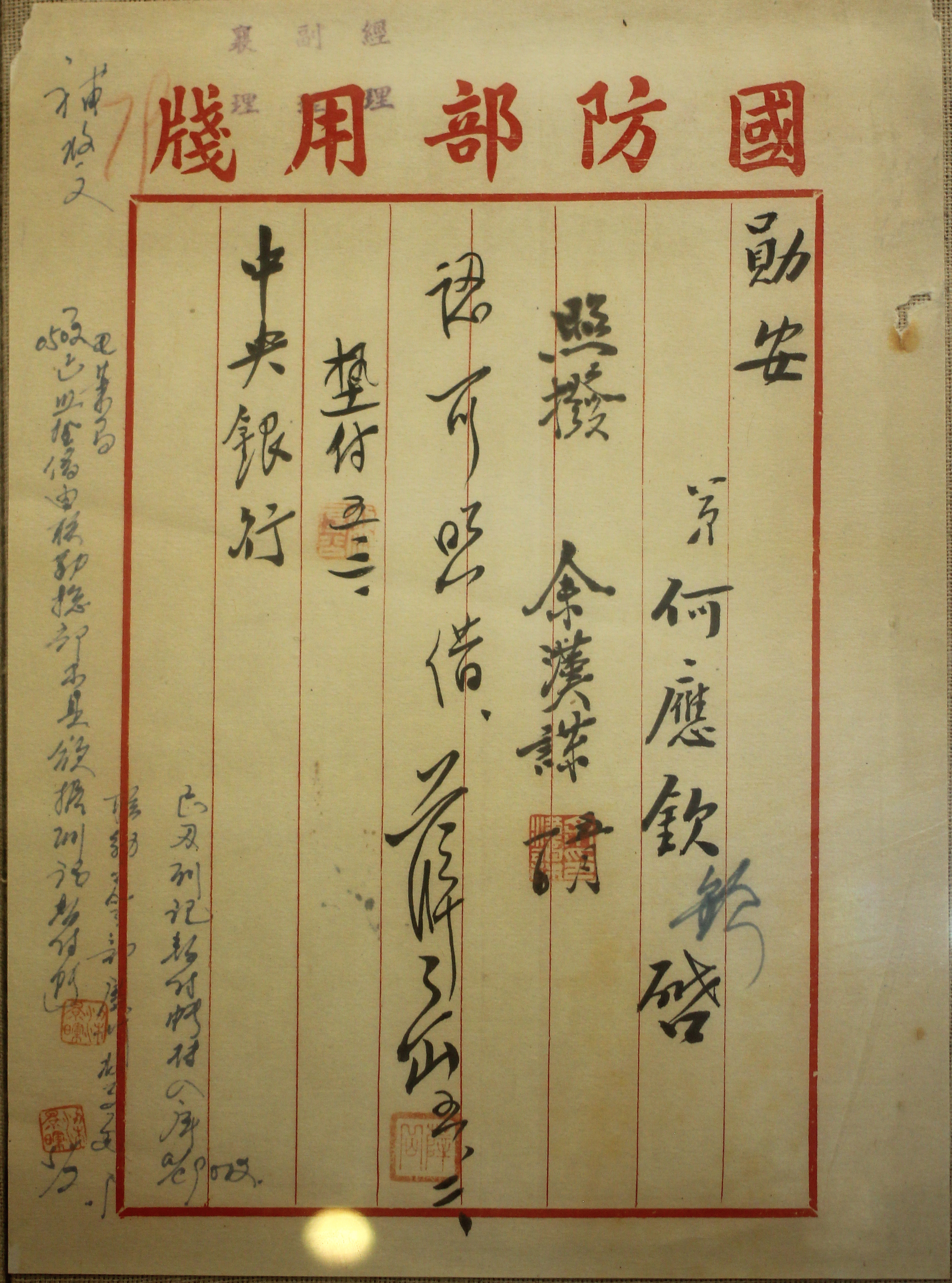 時任中華民國國防部部長何應欽有關軍事撥款的親筆信。